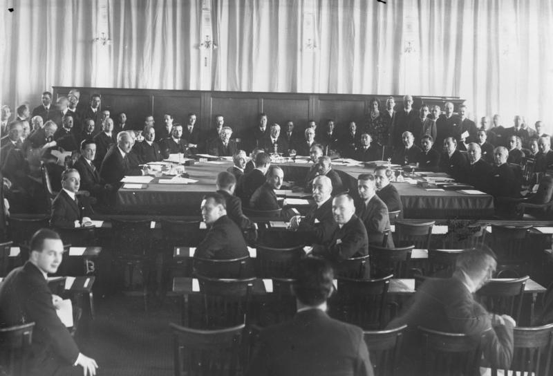 Die Völkerbundstagung in Genf, bei welcher über den deutsch-polnischen Conflikt und über die Abrüstungsfrage verhandelt wurde. Die Mitglieder des Völkerbundrates am Verhandlungstisch 1) Reichsaussenminister Dr. Curtius, 2) der italienische Aussenminister Dino Grandi, 3) der französische Aussenminister Briand, 4) der Vorsitzende der Ratstagung, der englische Aussenminister Henderson, 5) der polnische Aussenminister Zaleski.